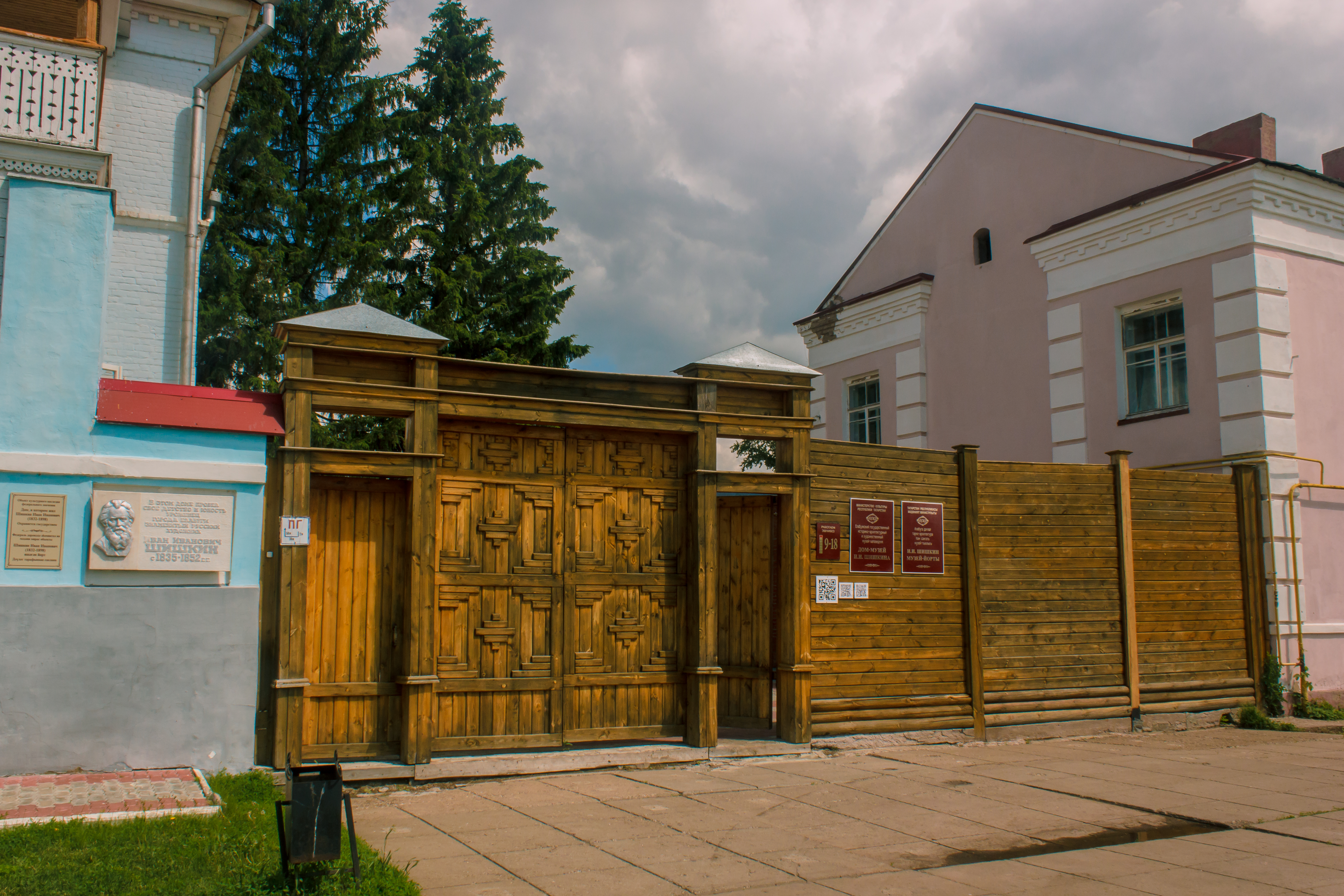 Дом, в котором в 1831-1898 гг. жил художник Шишкин И.И.: улица Набережная, 10, Елабуга, Татарстан